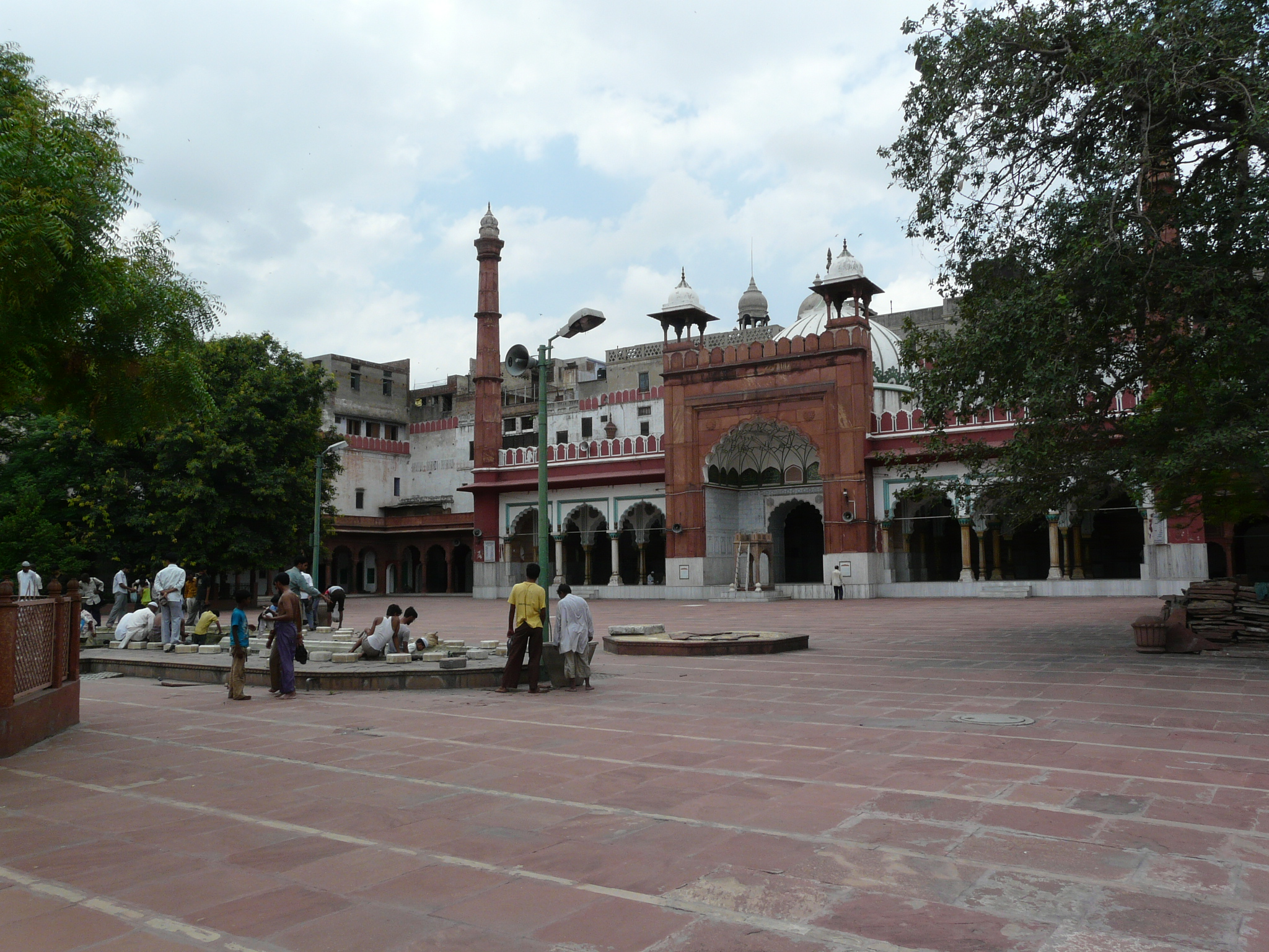 Fatehpuri Masjid Fatehpuri Masjid, Chandni Chowk, Delhi